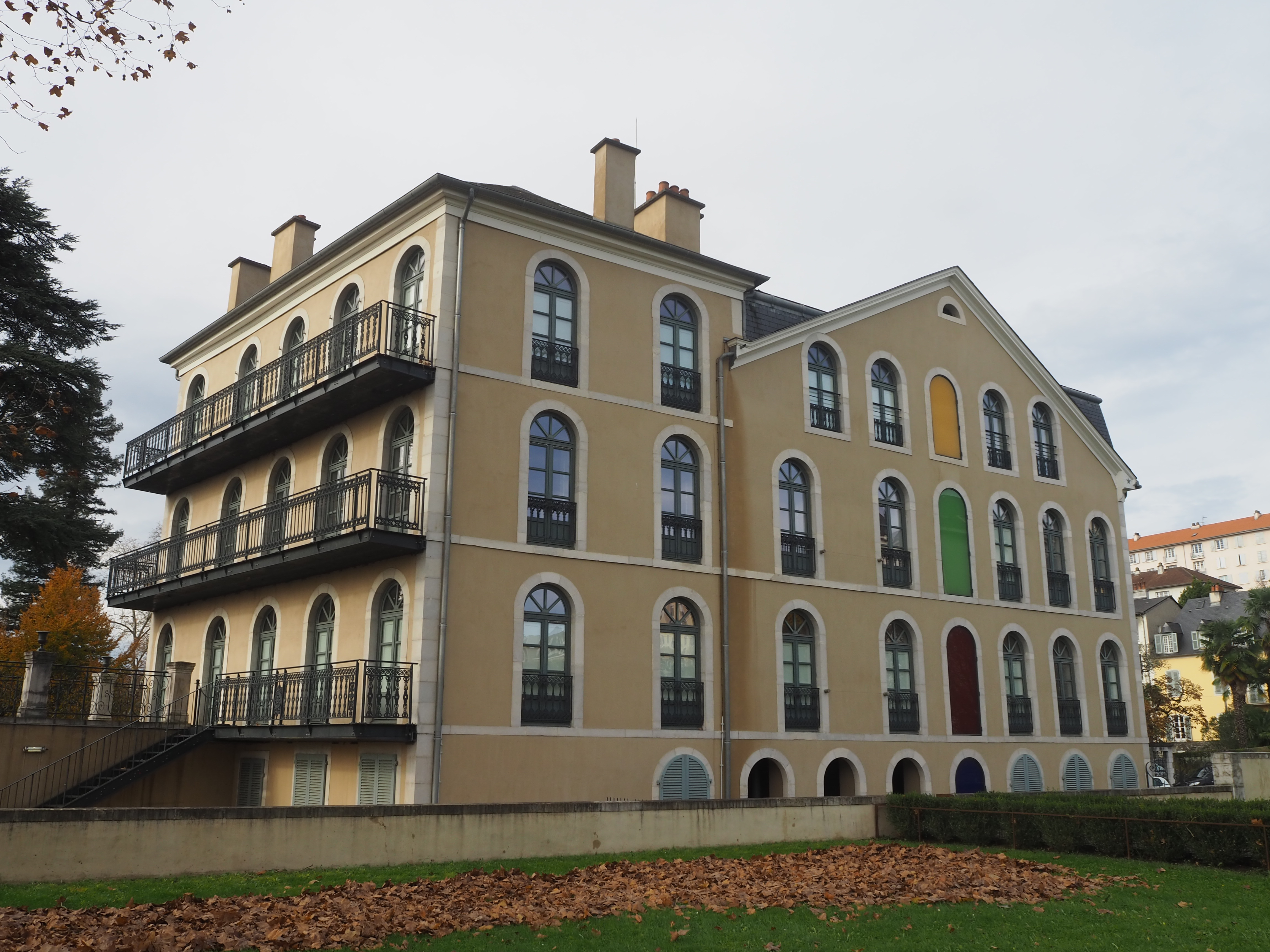 Maison Baylaucq, annexe du musée national du château de Pau.